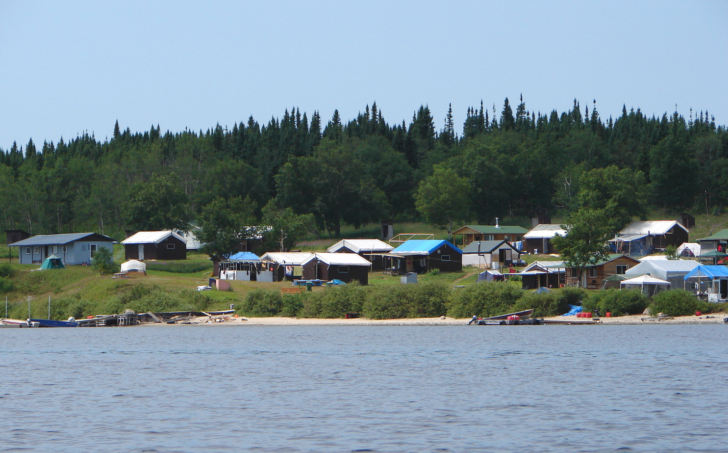 Nemiscau Cree settlement in Quebec, Canada.